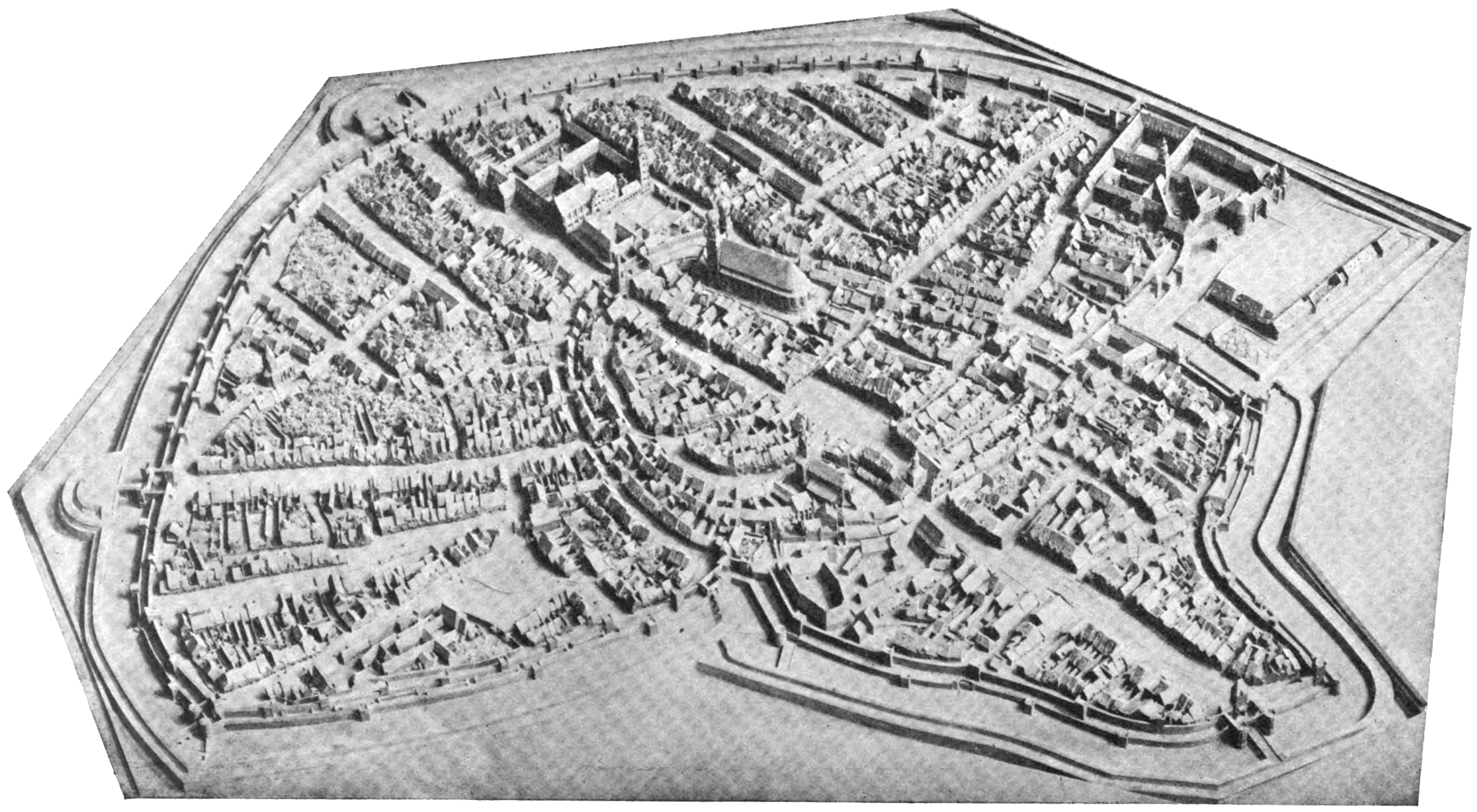 Munich 1570, Scale 1:616